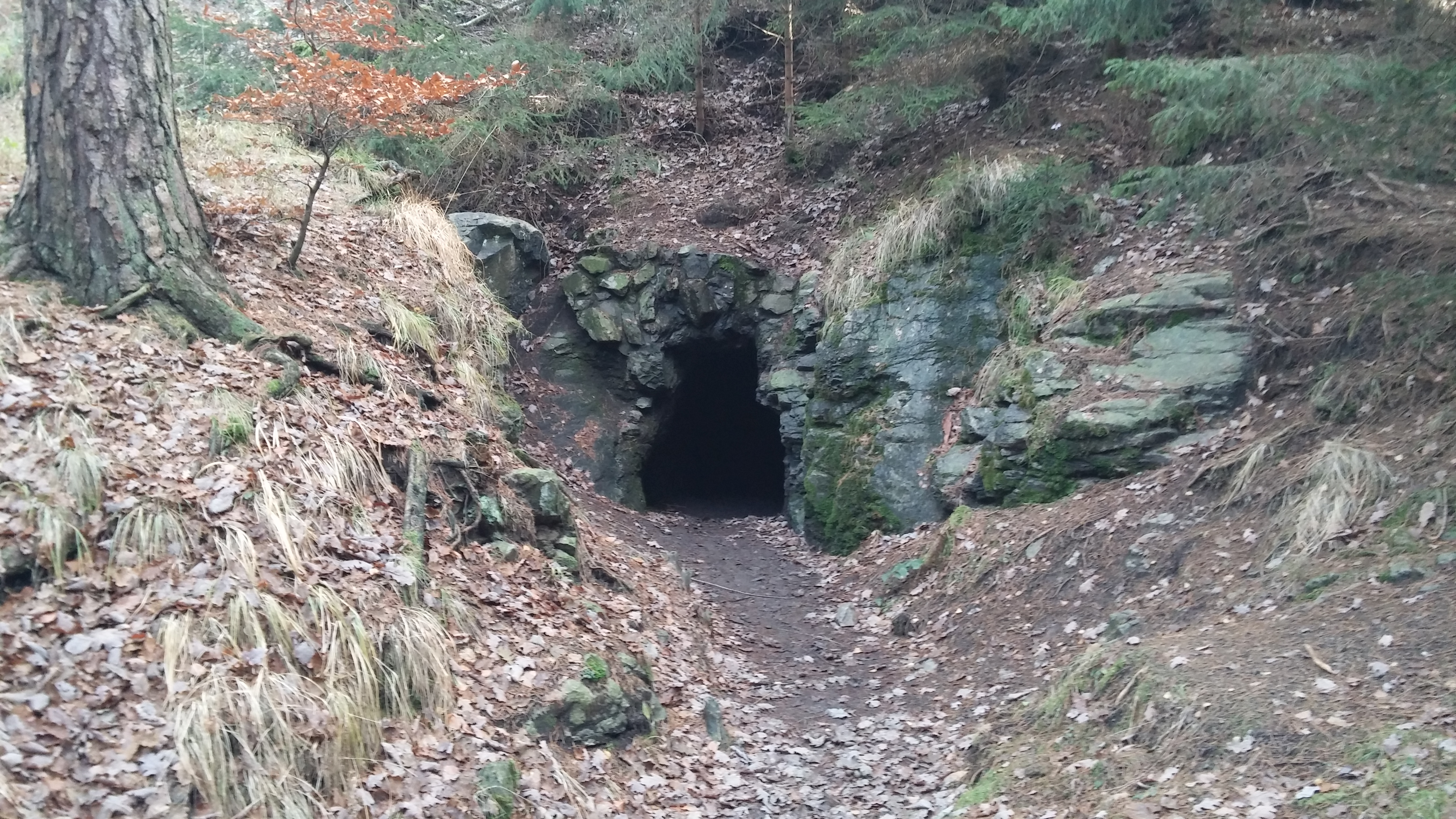 hier kann man reingehen, Licht erforderlich